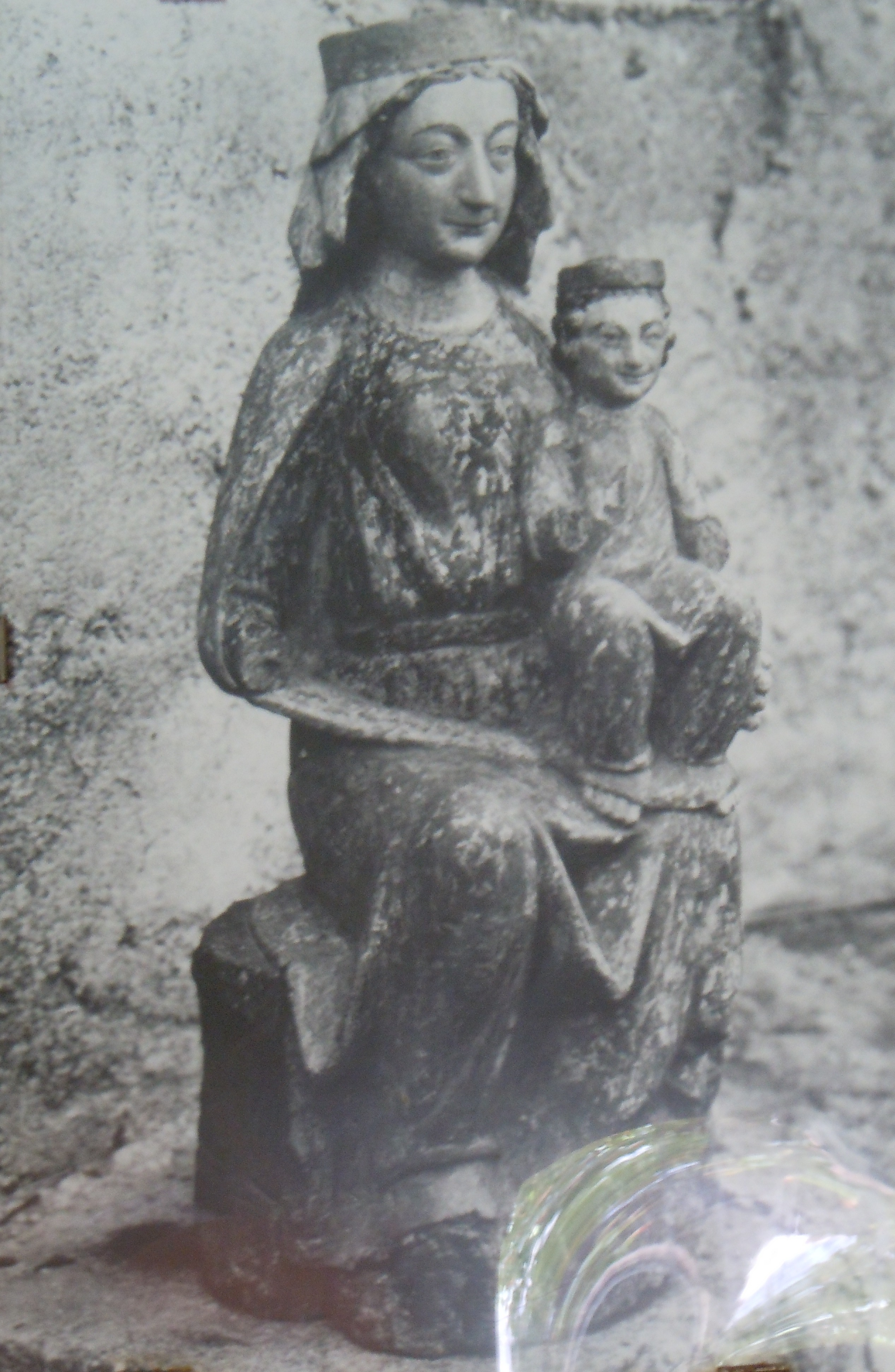 Vierge à l'Enfant - Notre-Dame de Thines - statue volée en 1973 - Malarce-sur-la-Thines - Ardèche - France